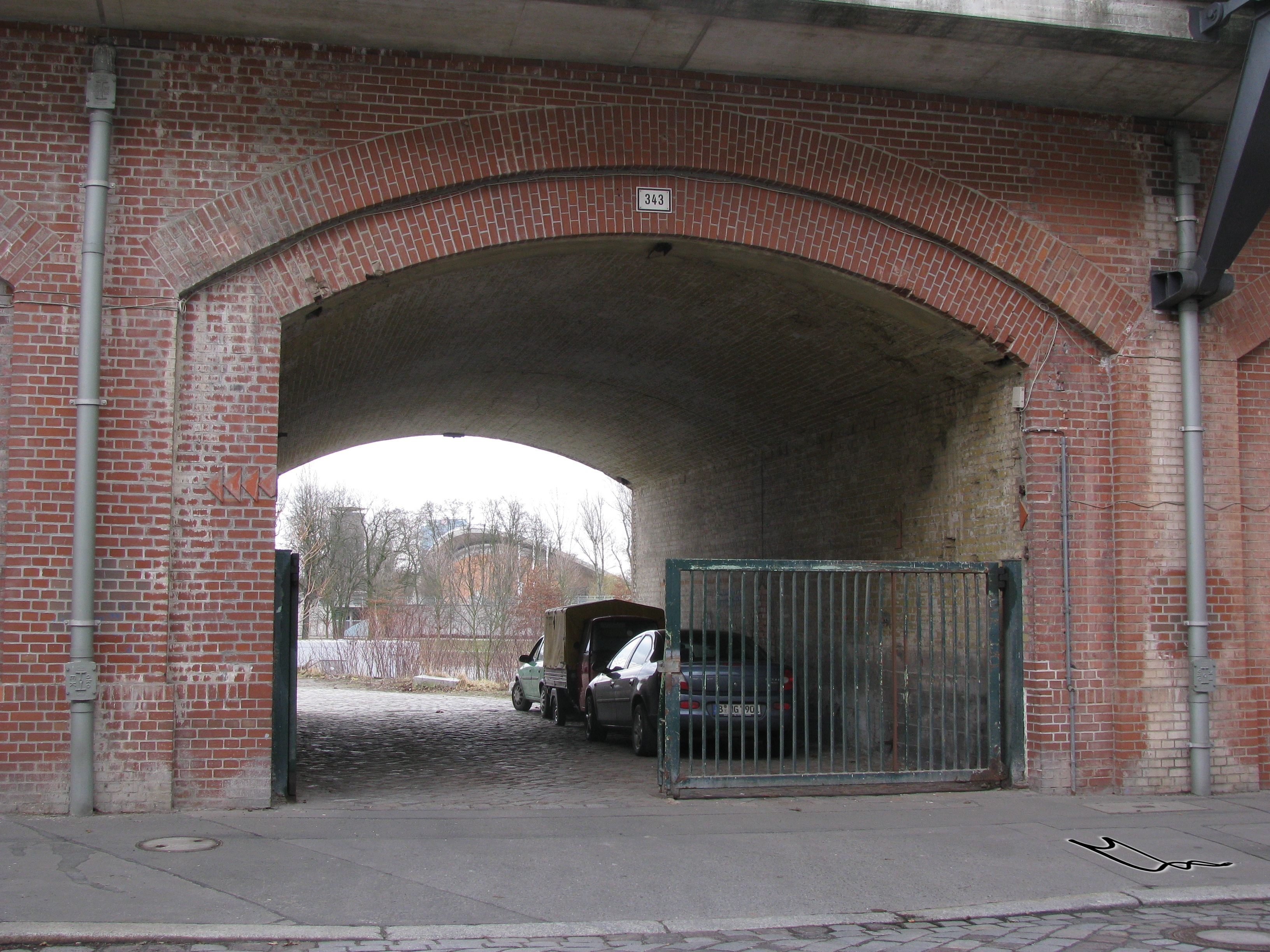 S-Bahn-Bogen Nummer 343 im Moabiter Werder vor dem Beginn der Bauarbeiten für das neue Innenministerium. Durch den Bogen ist die Kongresshalle (Haus der Kulturen der Welt) und das Glockenspiel Carillon zu sehen. Am oberen Rand sichtbar die Verbreiterung der Trasse in Beton, die beim Umbau des Lehrter Bahnhofs zum Hauptbahnhof durchgeführt wurde. Denkmalnummer 09011323 (Stadtbahntrasse); 09050270 (Kongreßhalle)